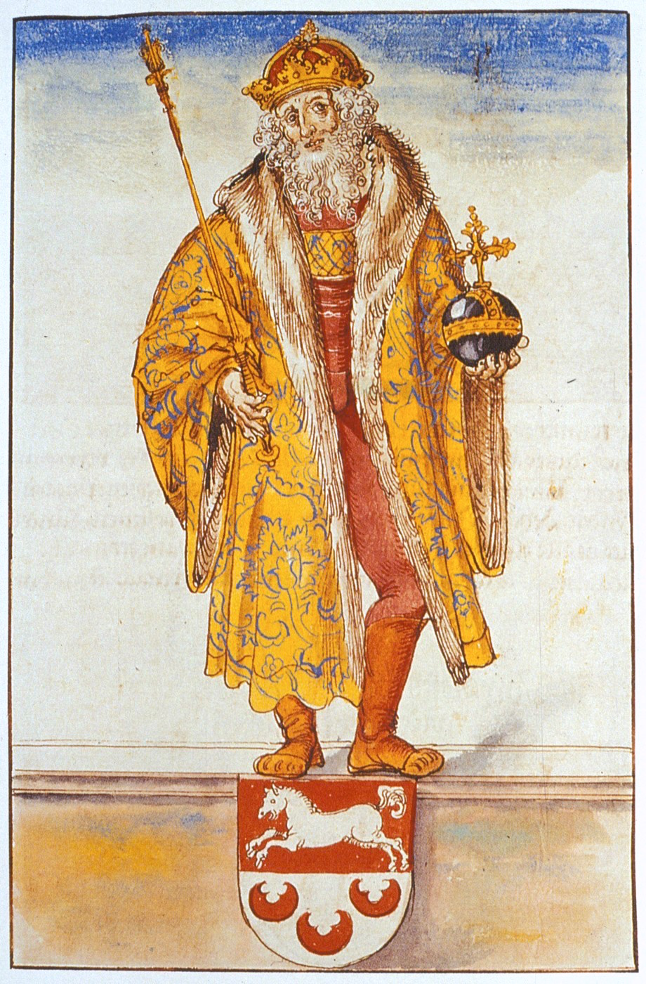 Chronik der Sachsen und Thüringer, around 1530/1535, Weimar